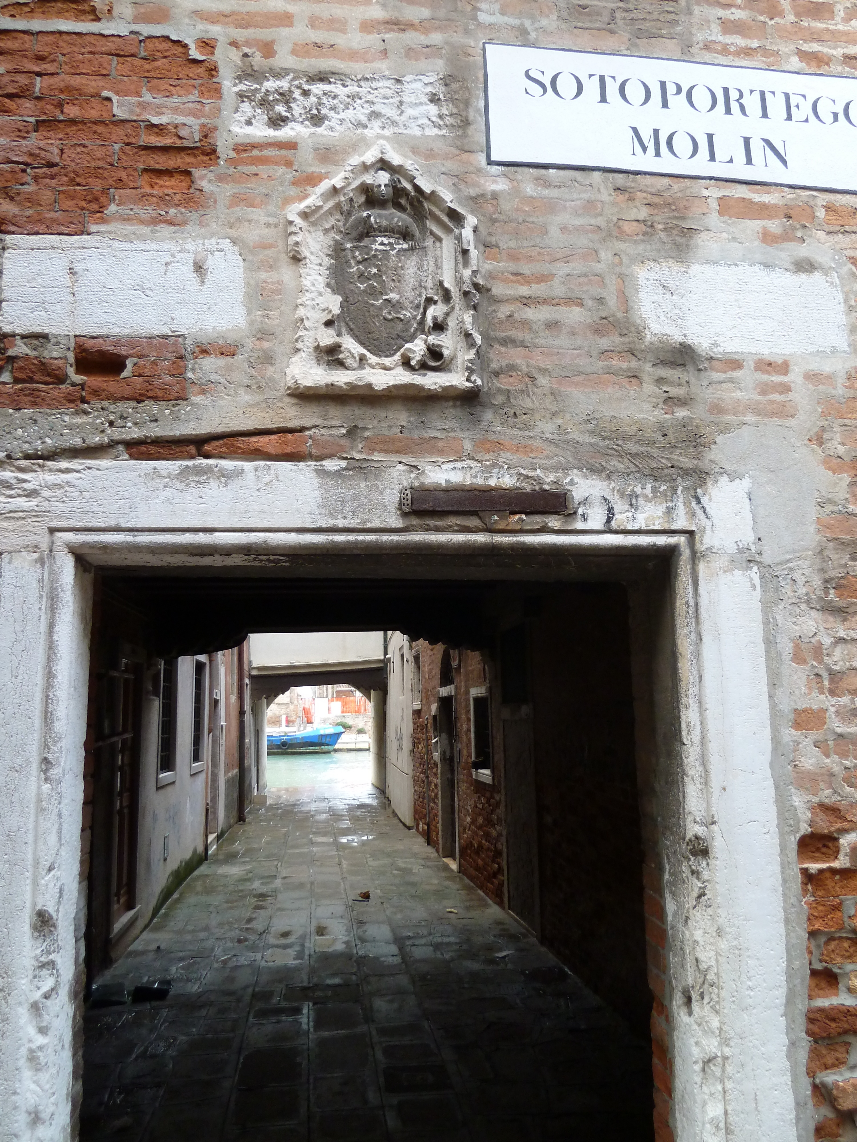 Sotoportego molin cannaregio